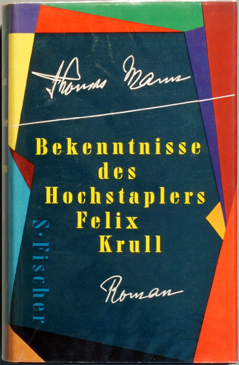 Mann, Thomas: Bekenntnisse des Hochstaplers Felix Krull. Frankfurt a. M.: S. Fischer 1954, 442 Seiten. Erstausgabe (Potempa D12.3.1).Orig.-Leinen 8° mit Orig.-Umschlag (in Klarsichtfolie eingelegt).